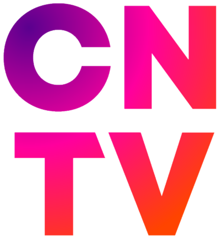 Consejo Nacional de Televisión de Chile